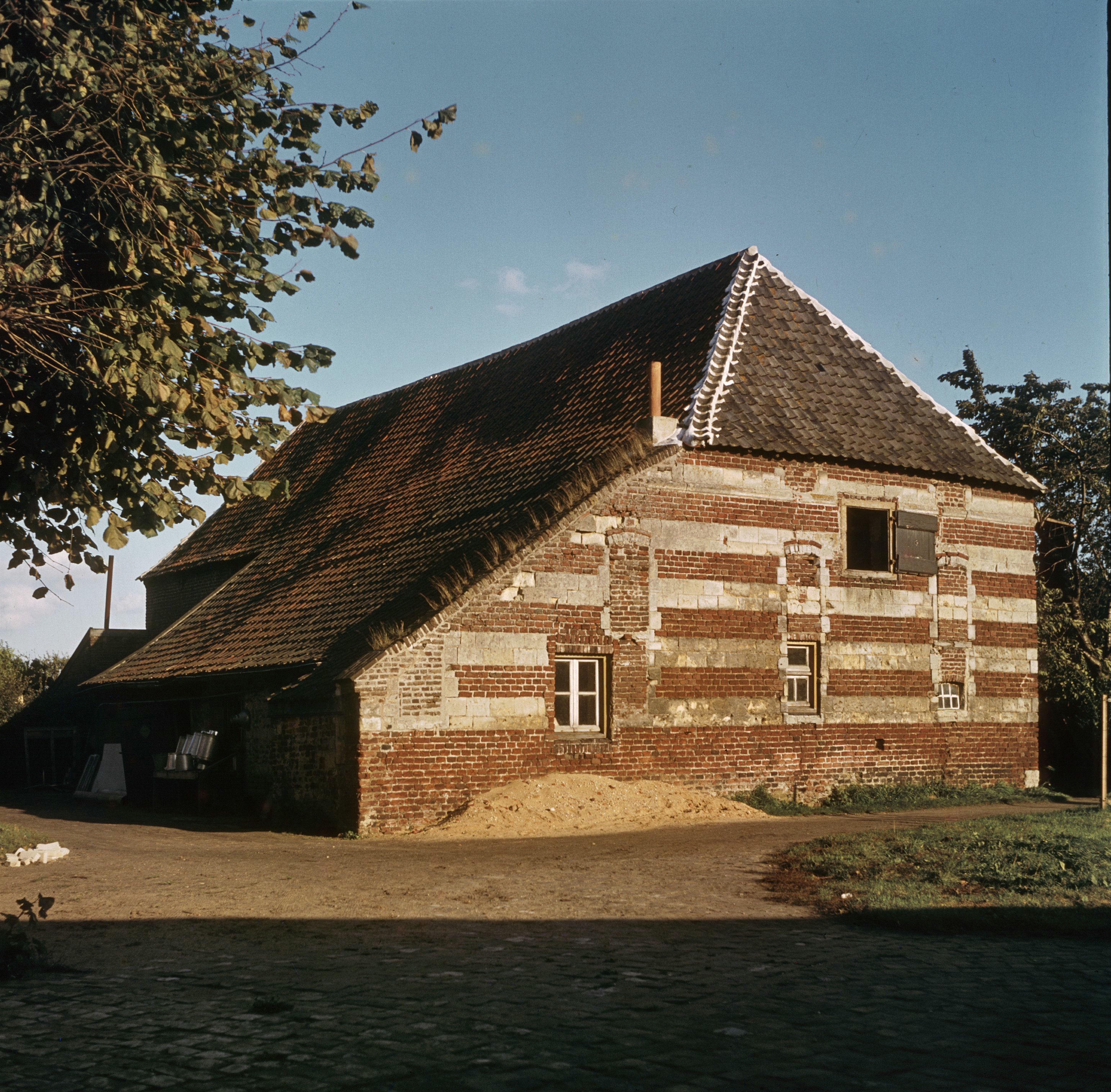 Latijnse School: Voorgevel en linker zijgevel